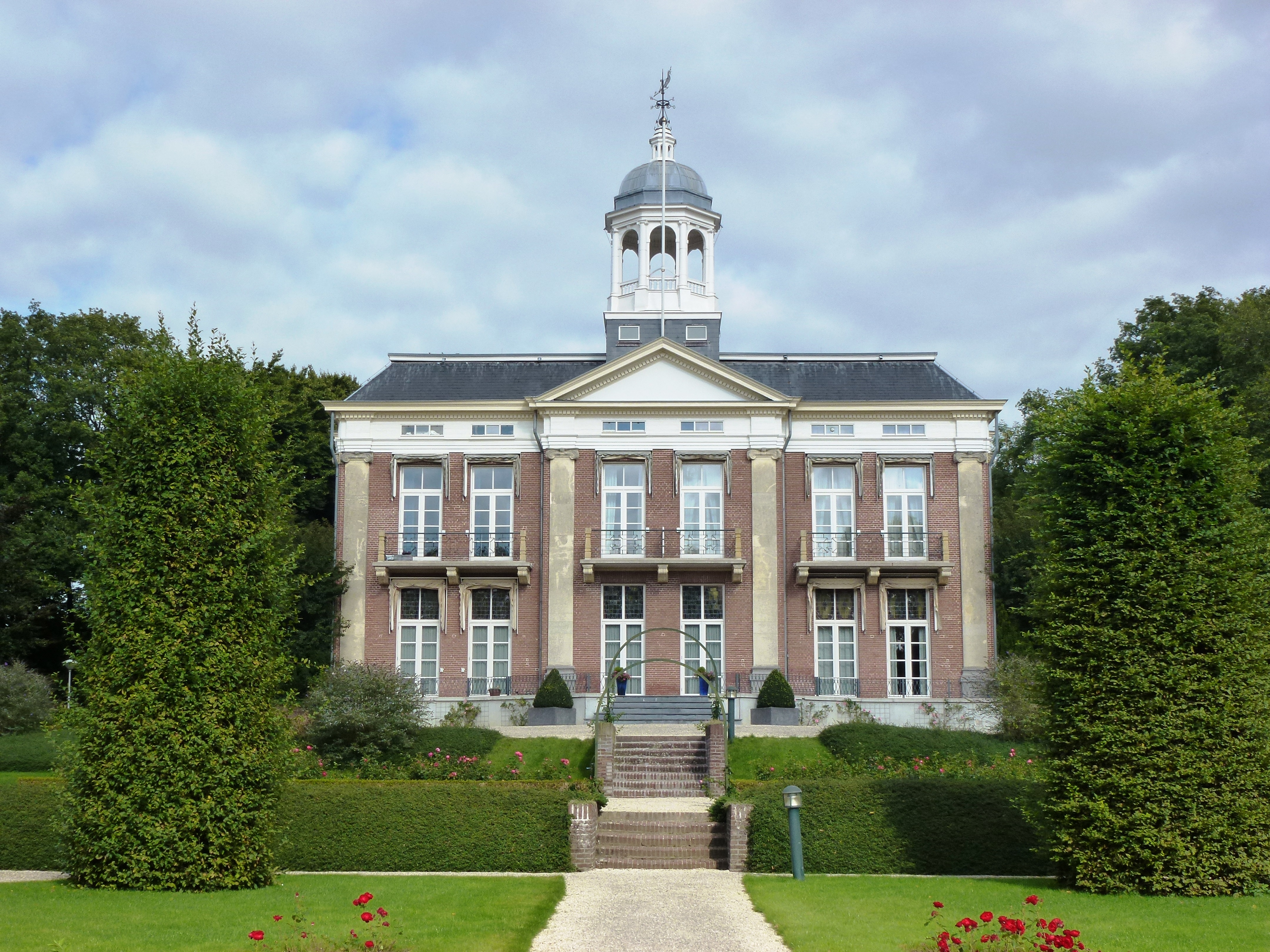 Nijmegen Villa Villandry (Villandry 50 tm 60) vanuit de tuin